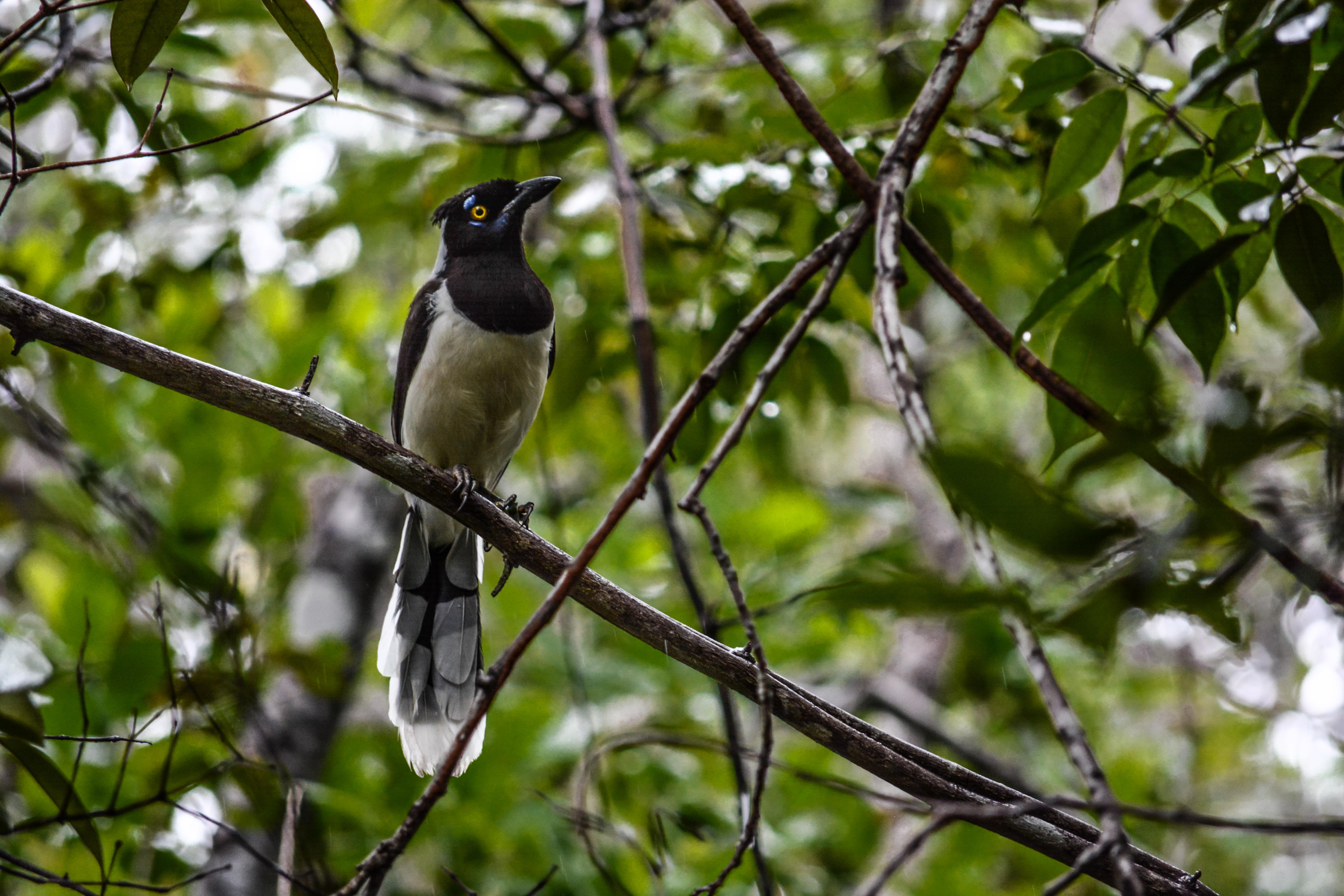 Pássaro posa para foto em trilha da Chapada Diamantina.